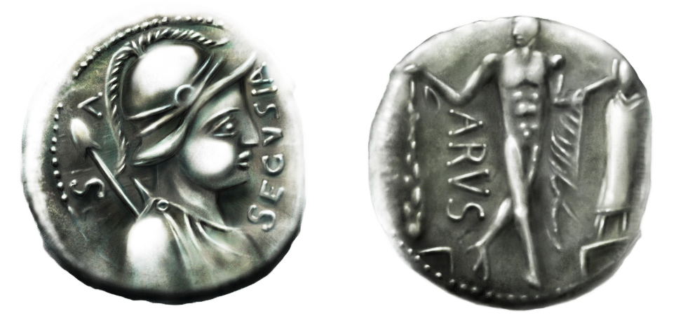 dessin du denier Segusiavs/arus